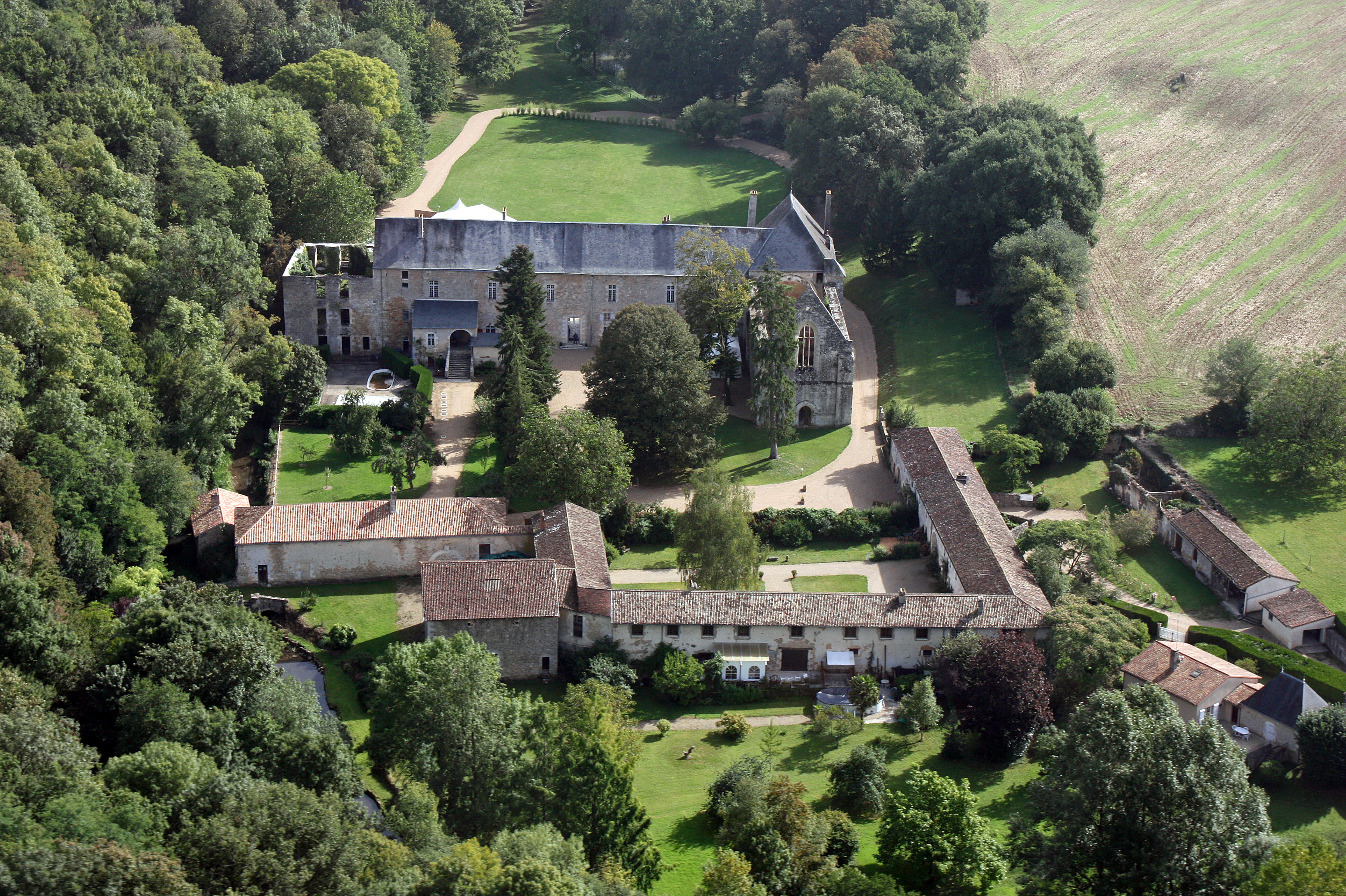 Abbaye du Pin